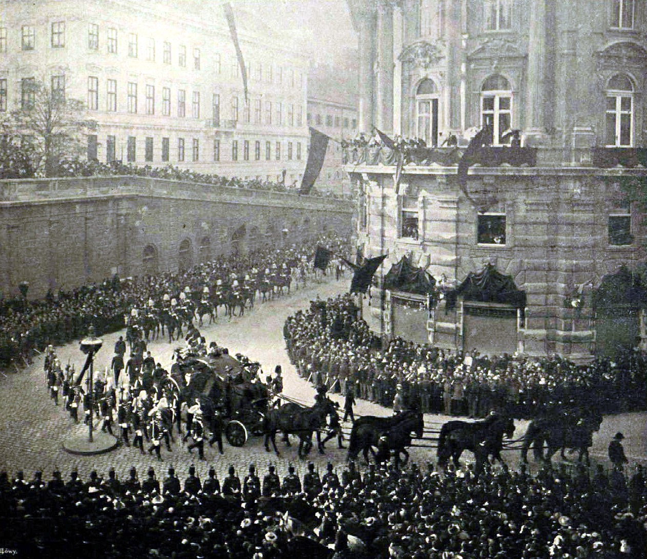 Erzsébet királyné temetése. Löwy Mór (Maurice Leowy) felvétele